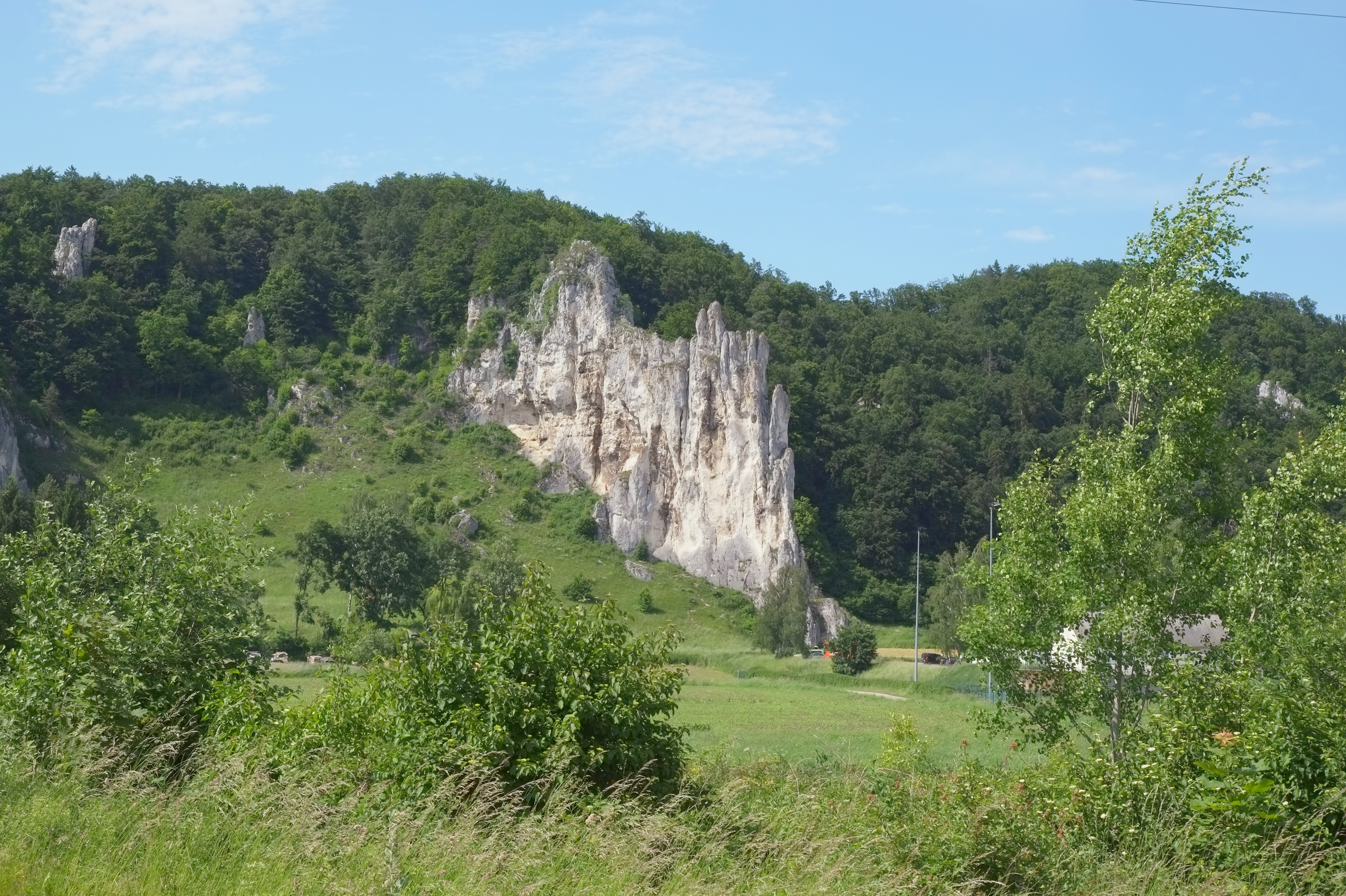 Felspartie in Wellheim-Aicha in Wellheim im Landkreis Eichstätt (Bayern)